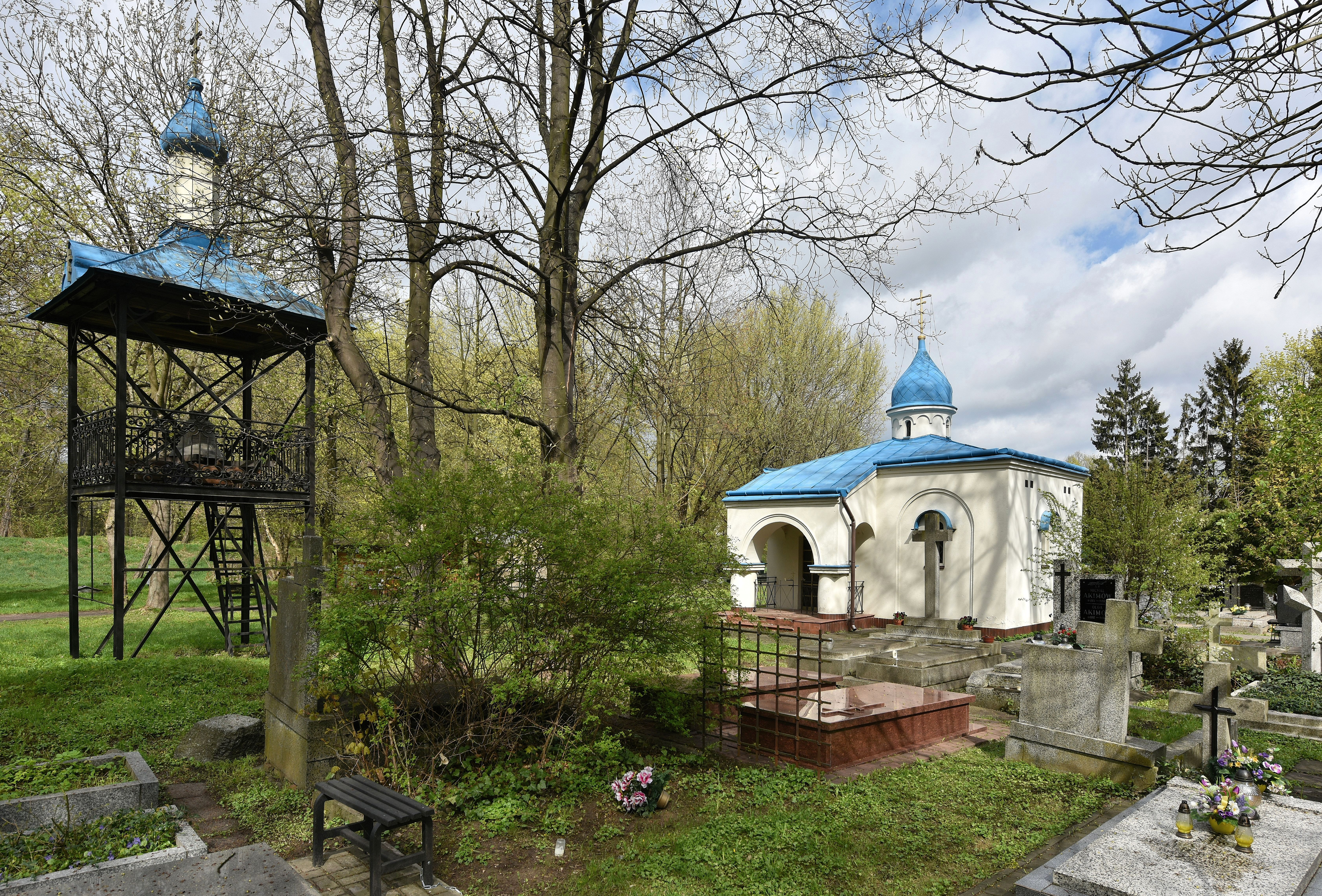 Kaplica Mieszczerskich na cmentarzu prawosławnym w Warszawie